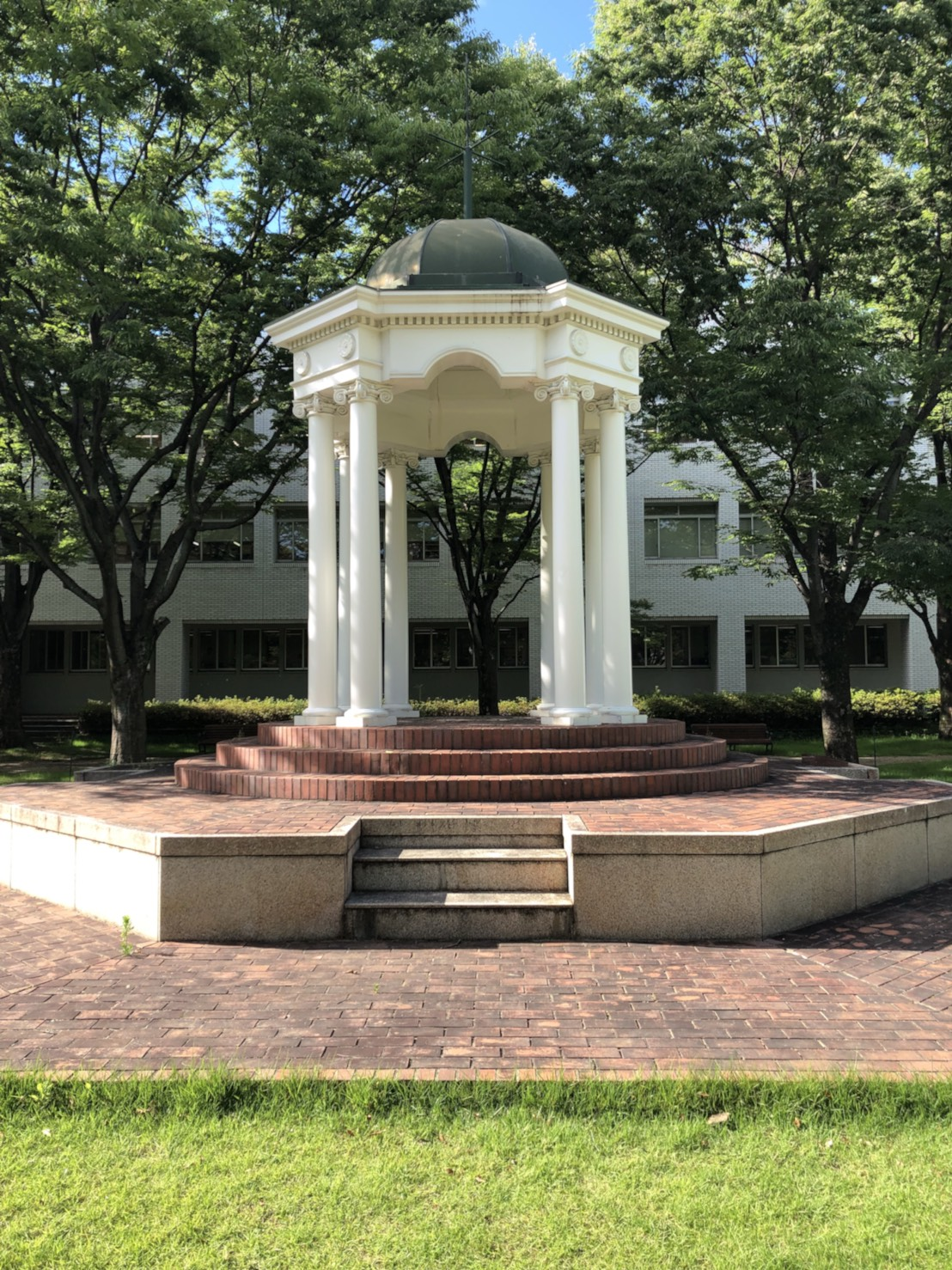 中部大学内にあるロタンダというオブジェ